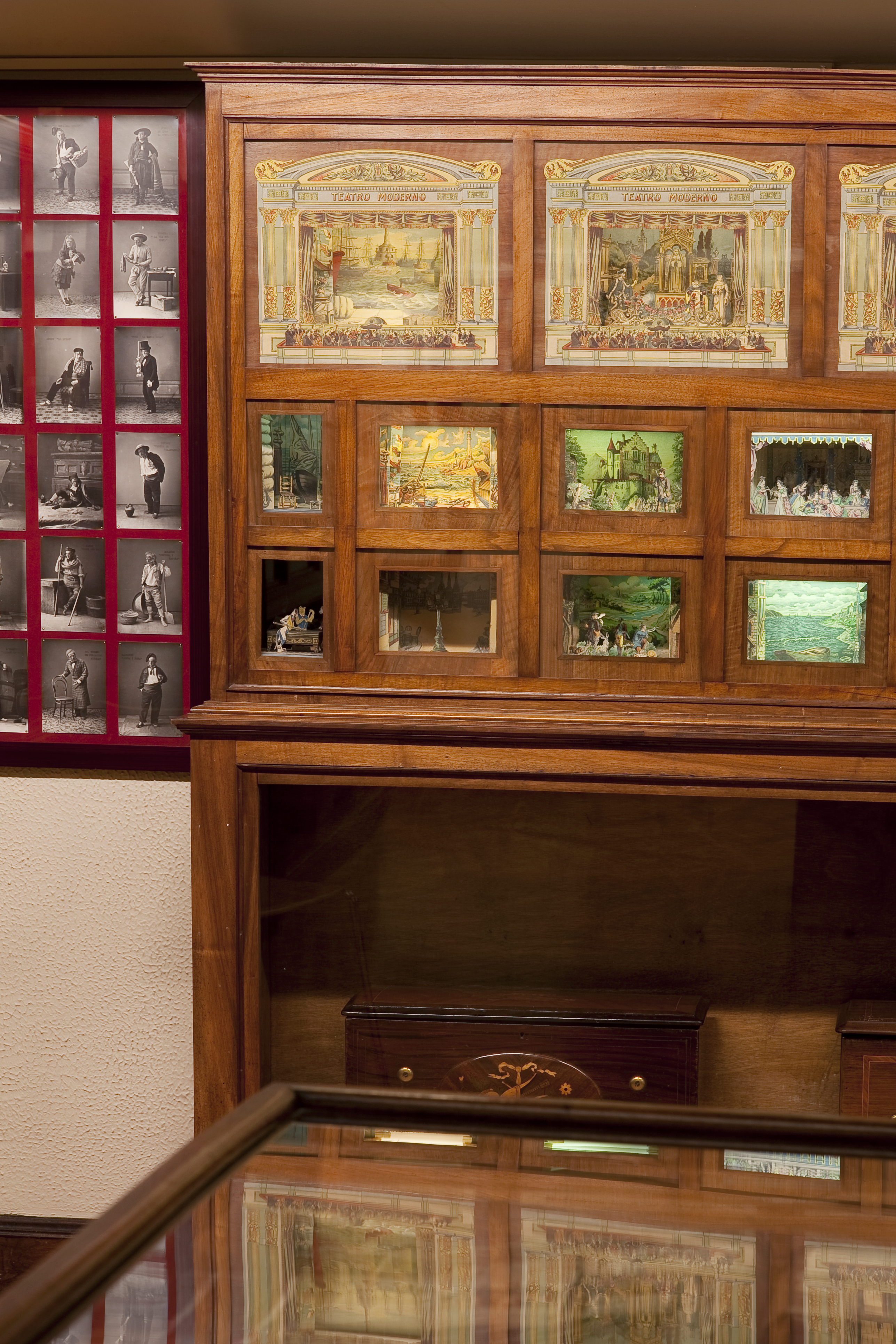 Diorames Gabinet col·leccionsta - Fot. GUILLEM F-H.jpg